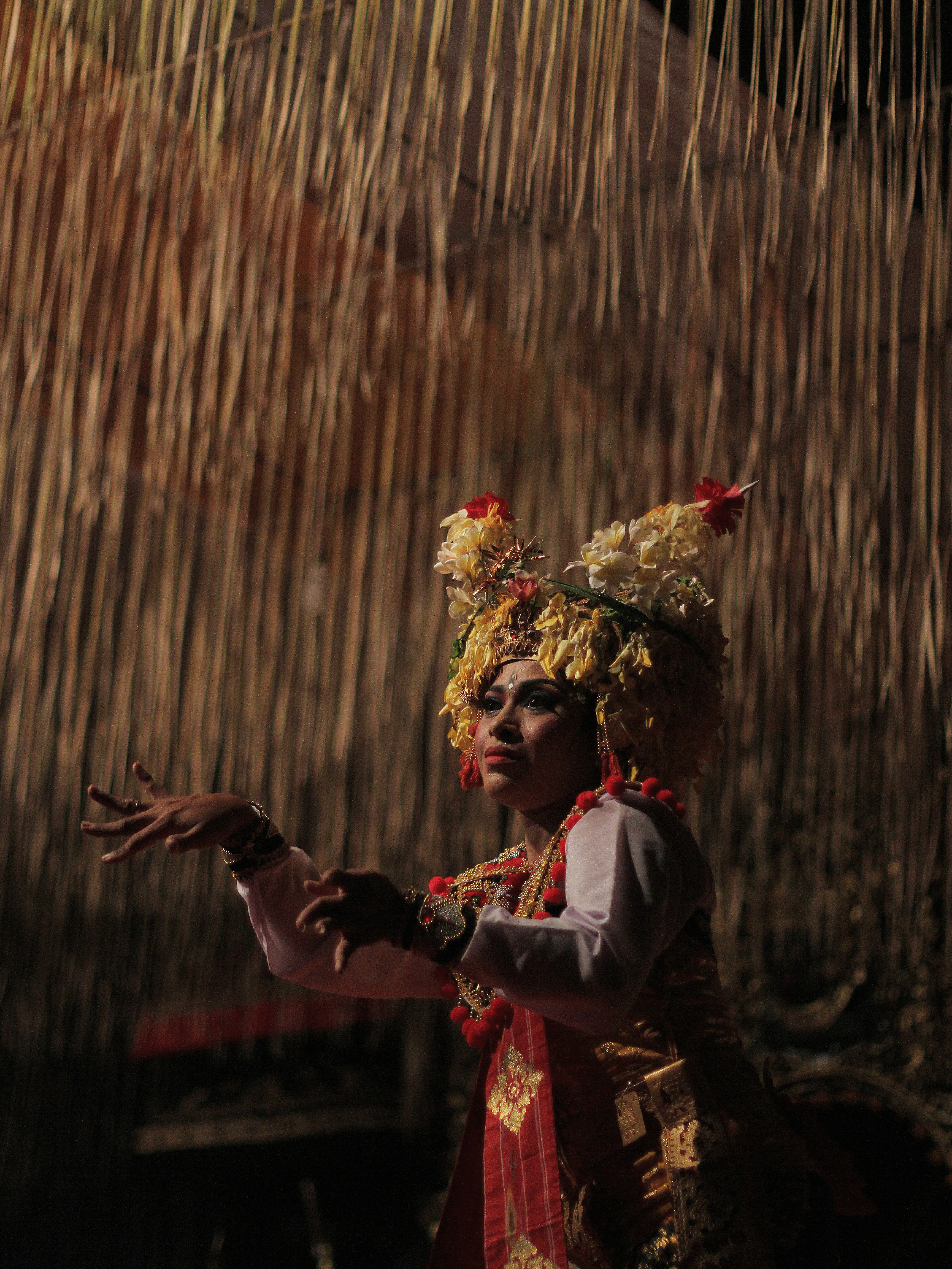 Tarian joged merupakan tarian salah satu tarian yang ada di daerah Bali..tarian joget pingit merupakan salah satu tarian sakral yang di perntaskan saat upacara adat di Bali.